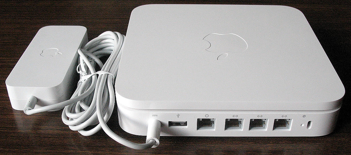 Apple Airport Extreme с блоком питания. Изготовитель изделия: Компания Apple